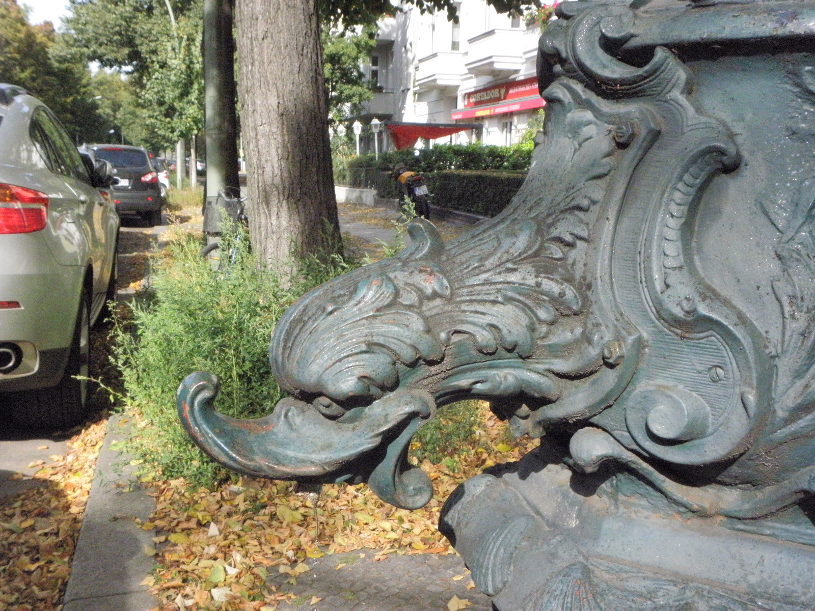 Tegeler Weg, histor. Handpumpe, Detail